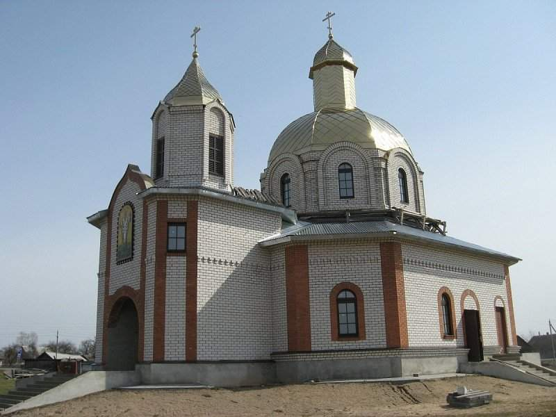 Свята-Мікалаеўская царква ў аграгарадку Свіслач Асіповіцкага раёна Магілёўскай вобласці Беларусі